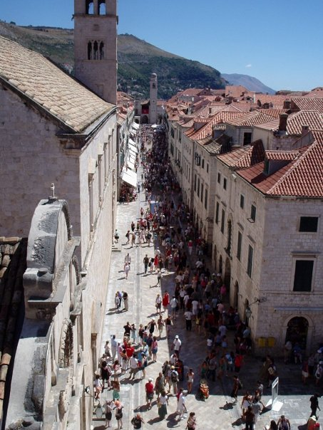 Stradun, Dubrovnik, Hrvatska